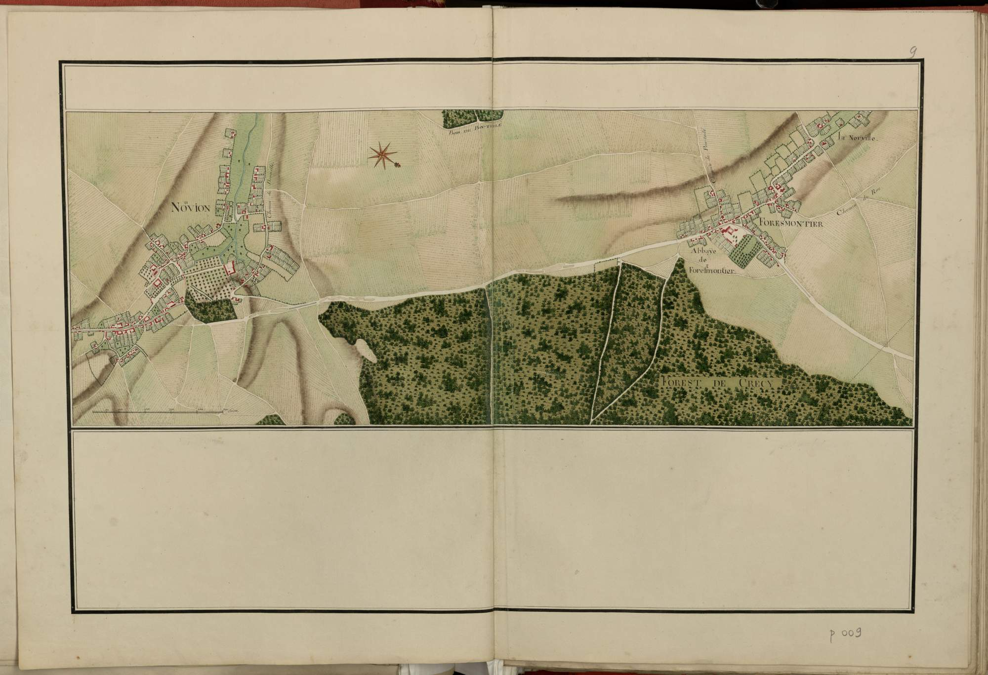 Forest-Montiers-Nouvion, Trudaine : Atlas- 1745-1780.